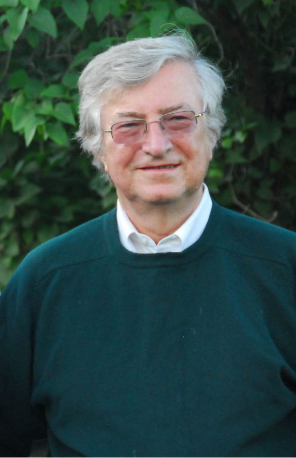 zdjecie autora biogramu Andrzej Targowski